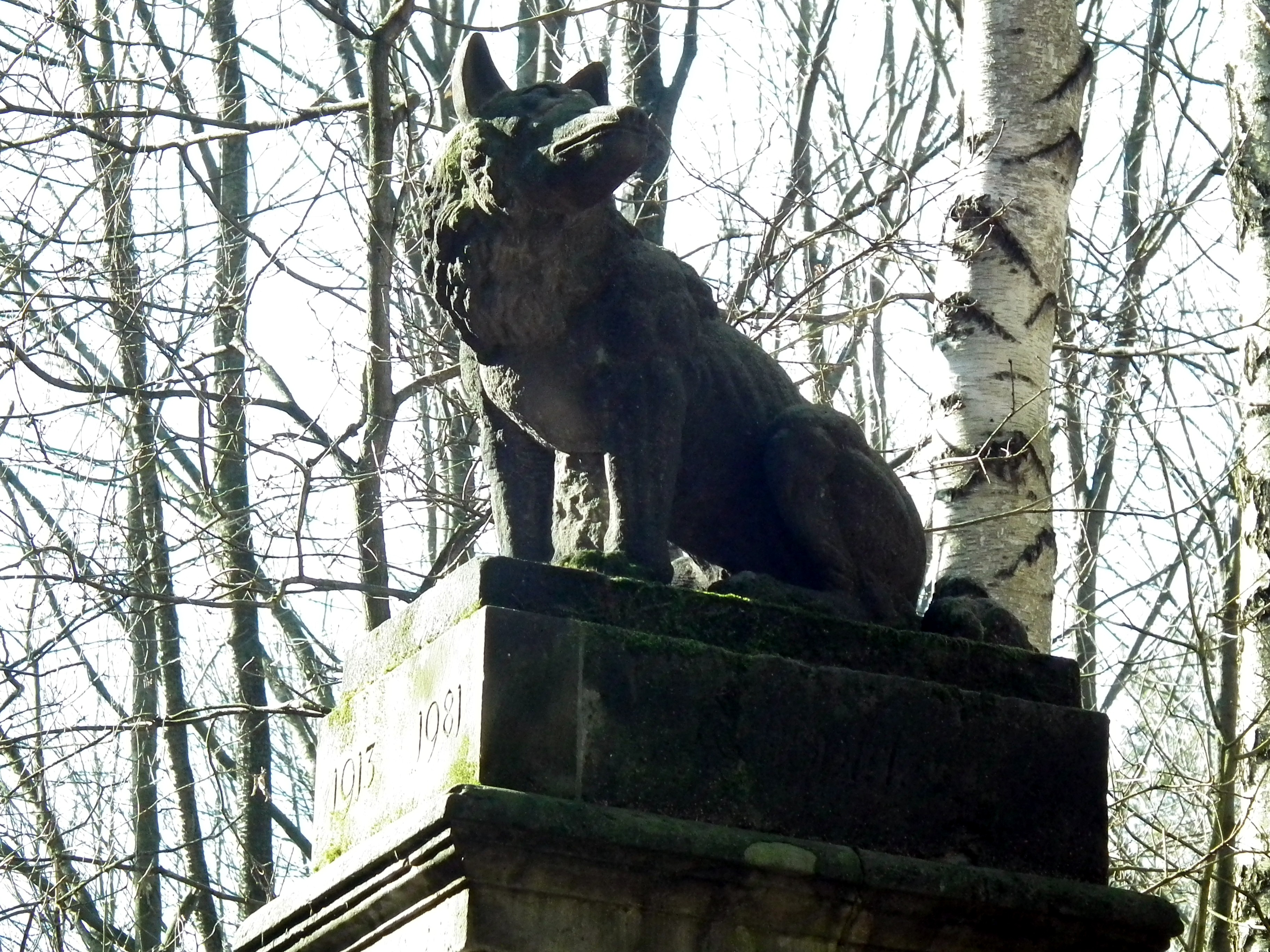 Wolfssäule Friedewald, Weinböhla, Sachsen, Deutschland